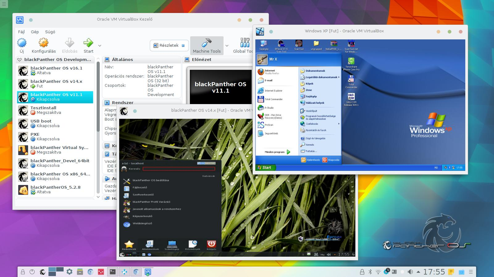 A magyar blackPanther OS-en futtatott VirtualBox, és az abban futó Windows XP, illetve egy korábbi blackPanther OS kiadás egyidőben